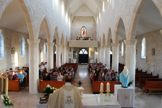 Unutrašnjost crkve sv .Katarine_Grude